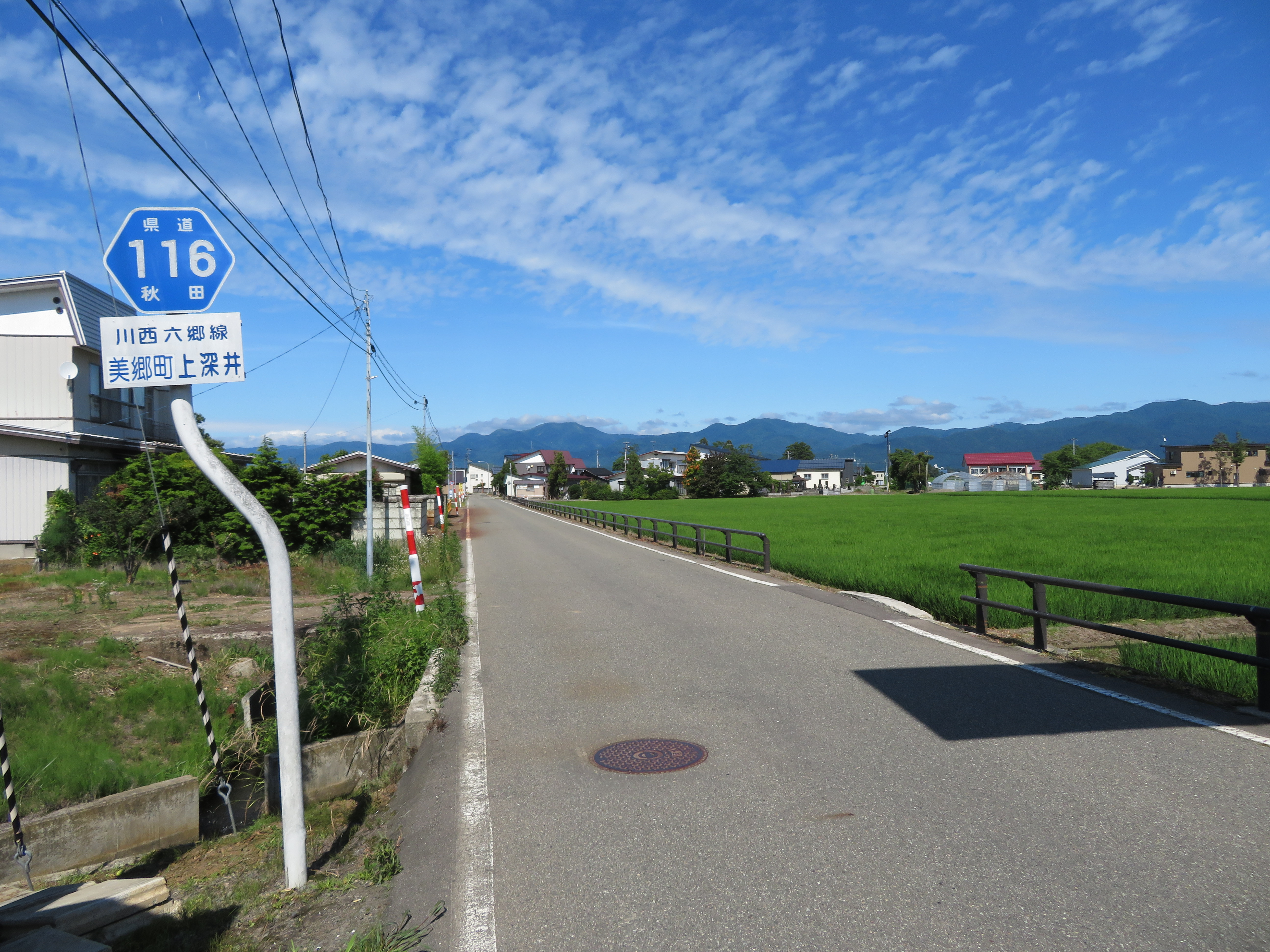 秋田県道116号線美郷町上深井付近（国道13号方面を撮影）